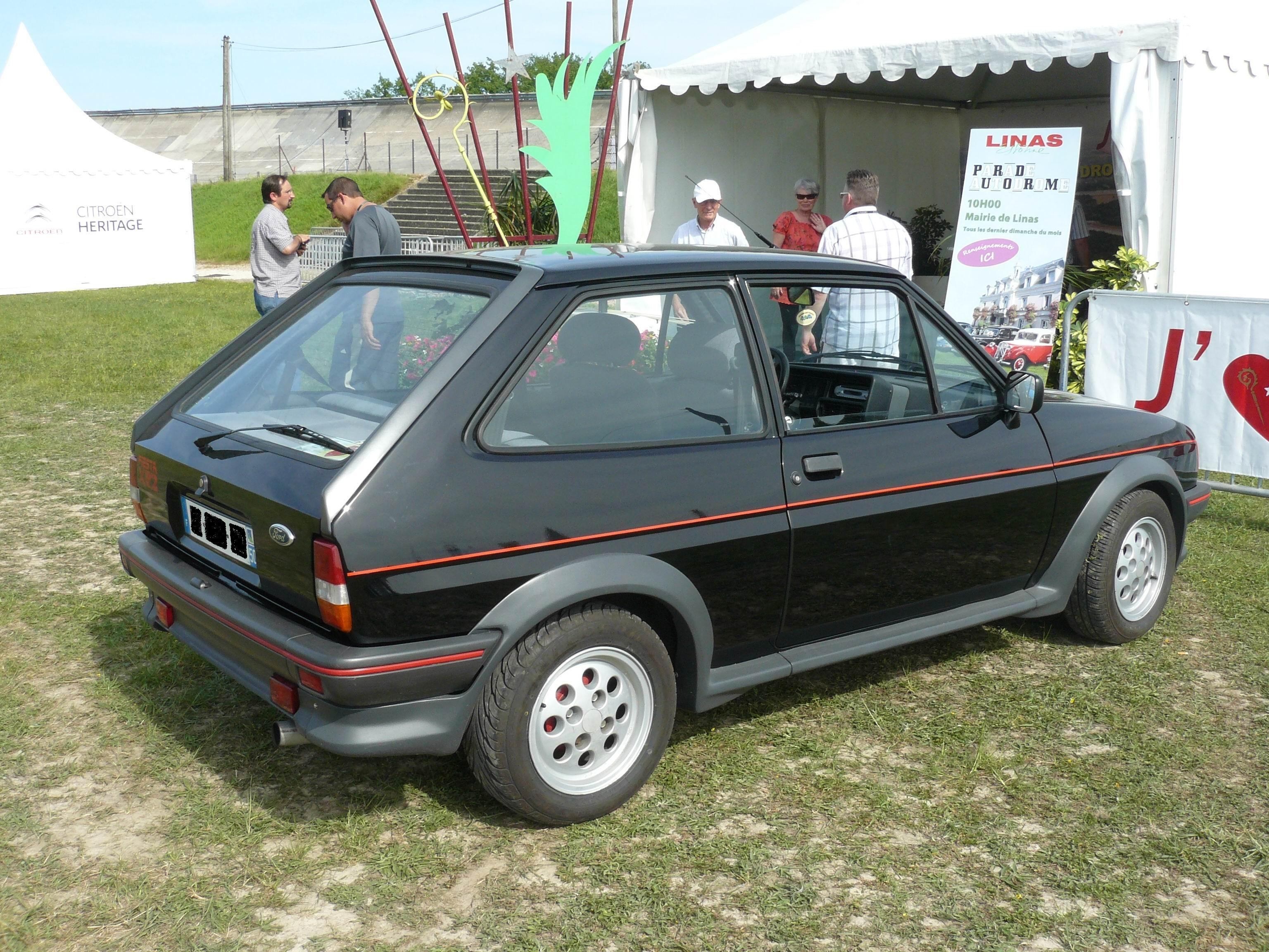 Ford Fiesta XR2 Montlhery 2012